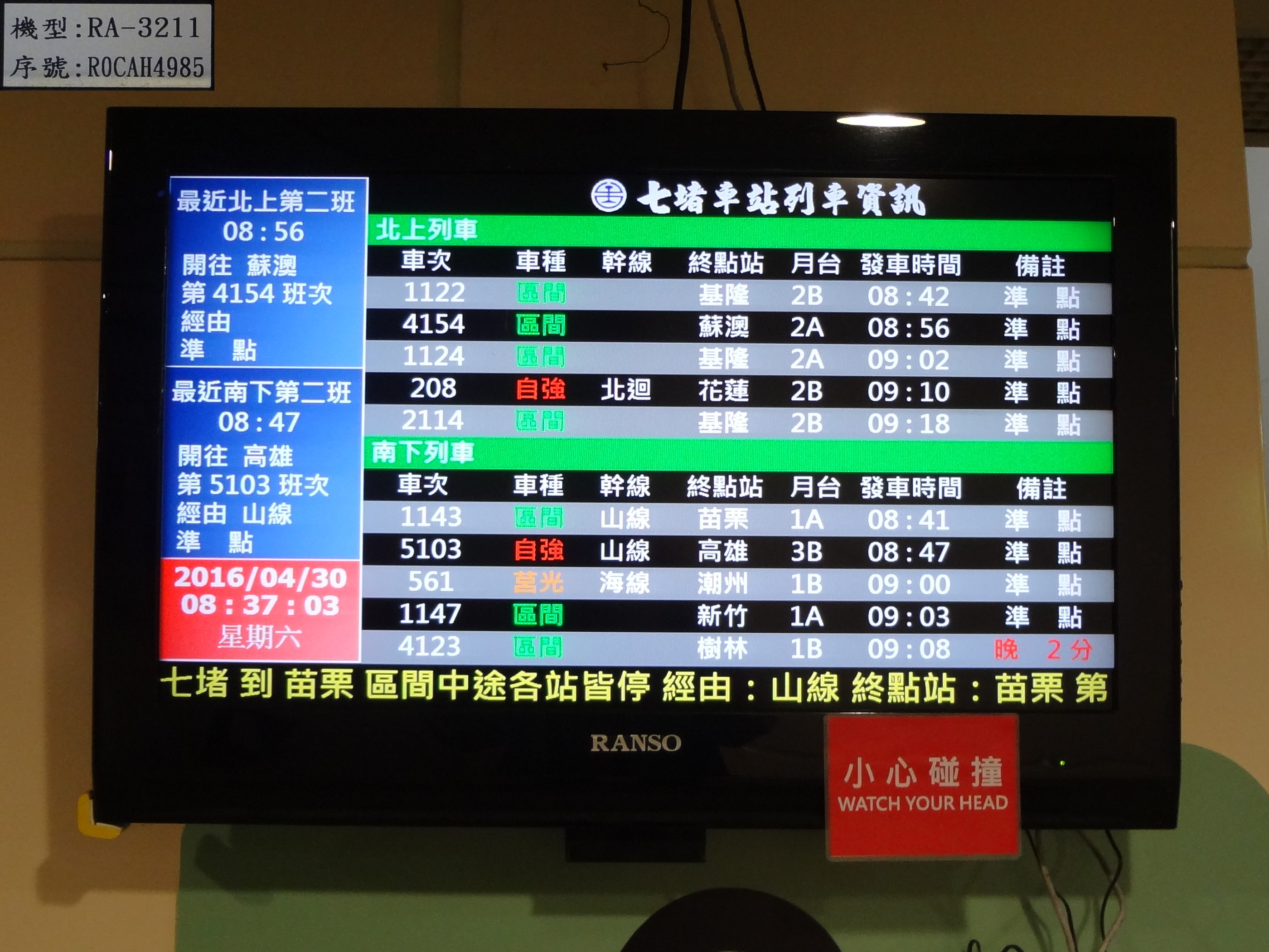 中文（台灣）: 臺灣鐵路管理局七堵車站使用的禾聯碩液晶顯示器Ranso RA-3211，顯示列車資訊。